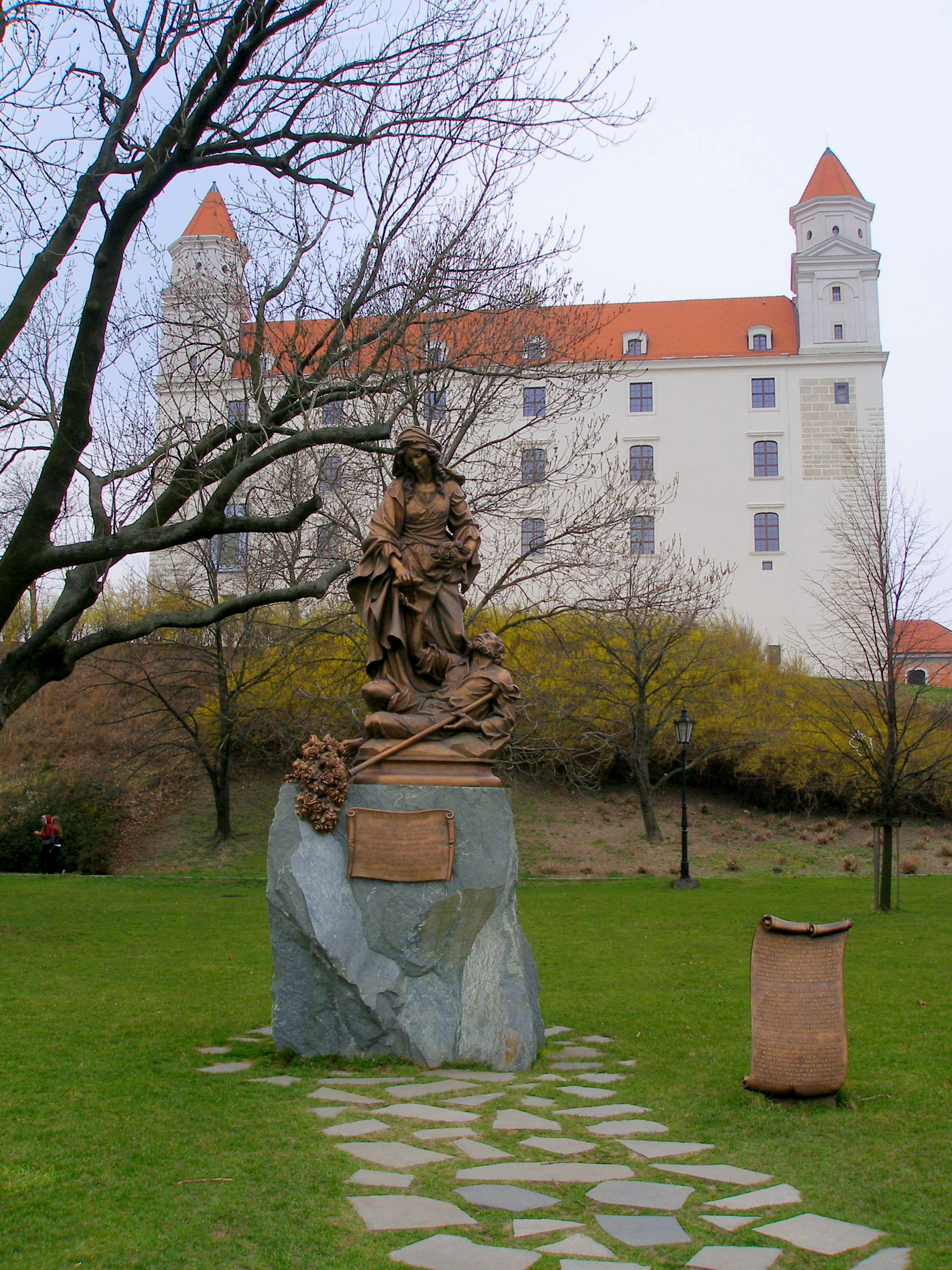 Bratislava hlavné mesto Slovenskej republiky.Hradný vrch.